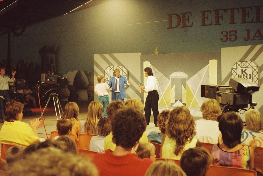 Henny Huisman maakt TV-opnames in de Efteling, 1986. Eigen foto.